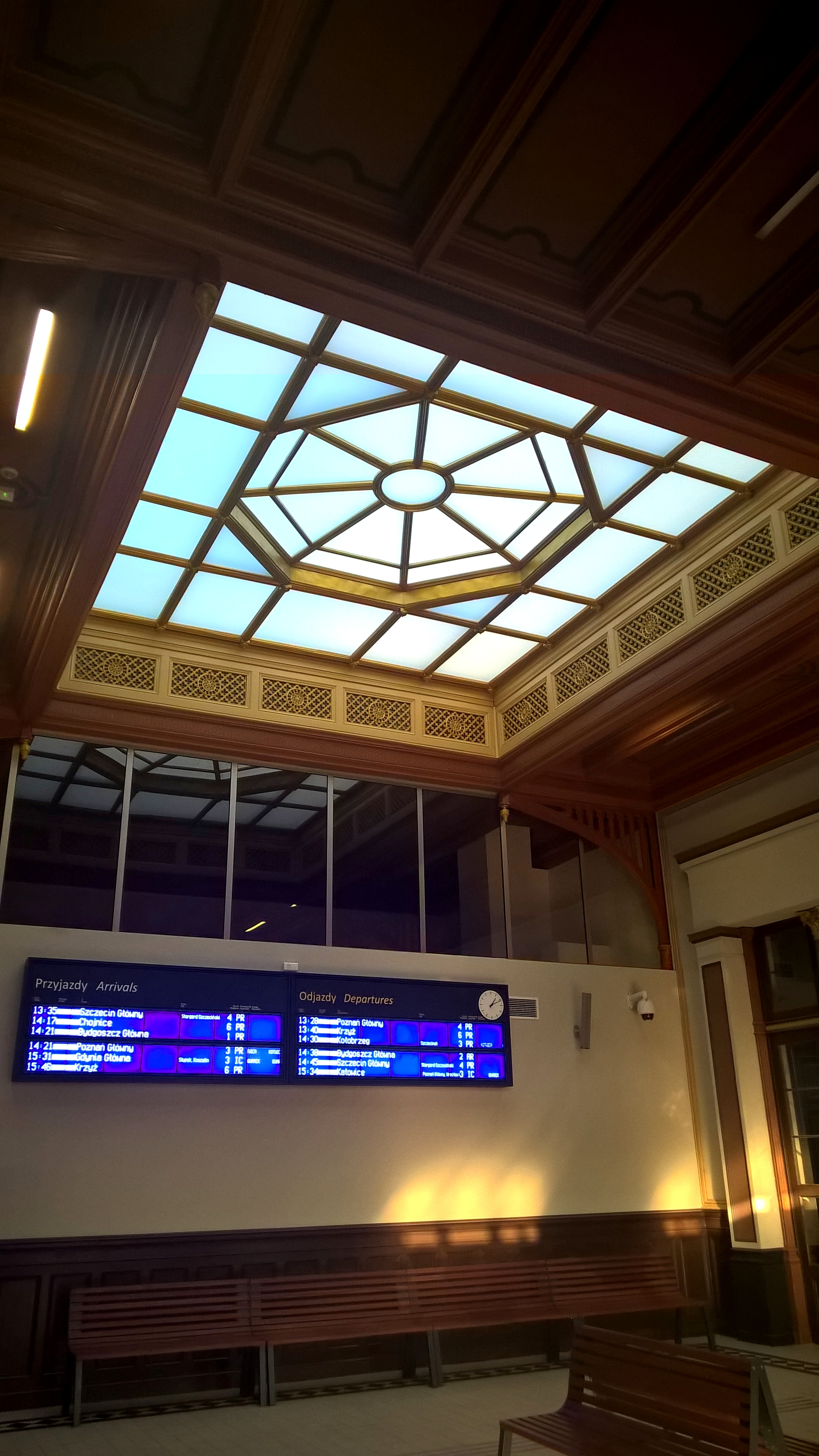 Świetlik w holu kasowym.